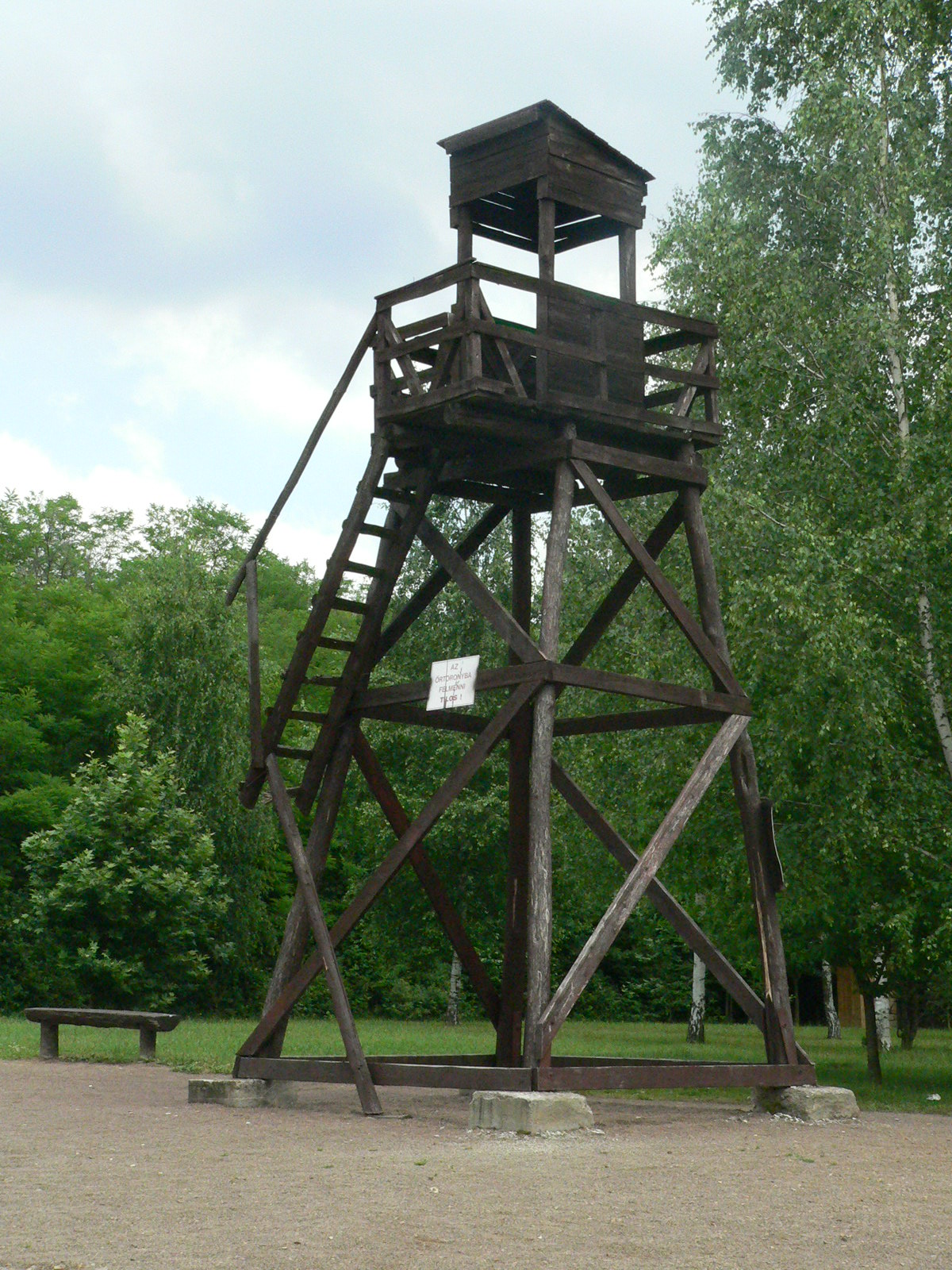 Egykori őrtorony Recsken